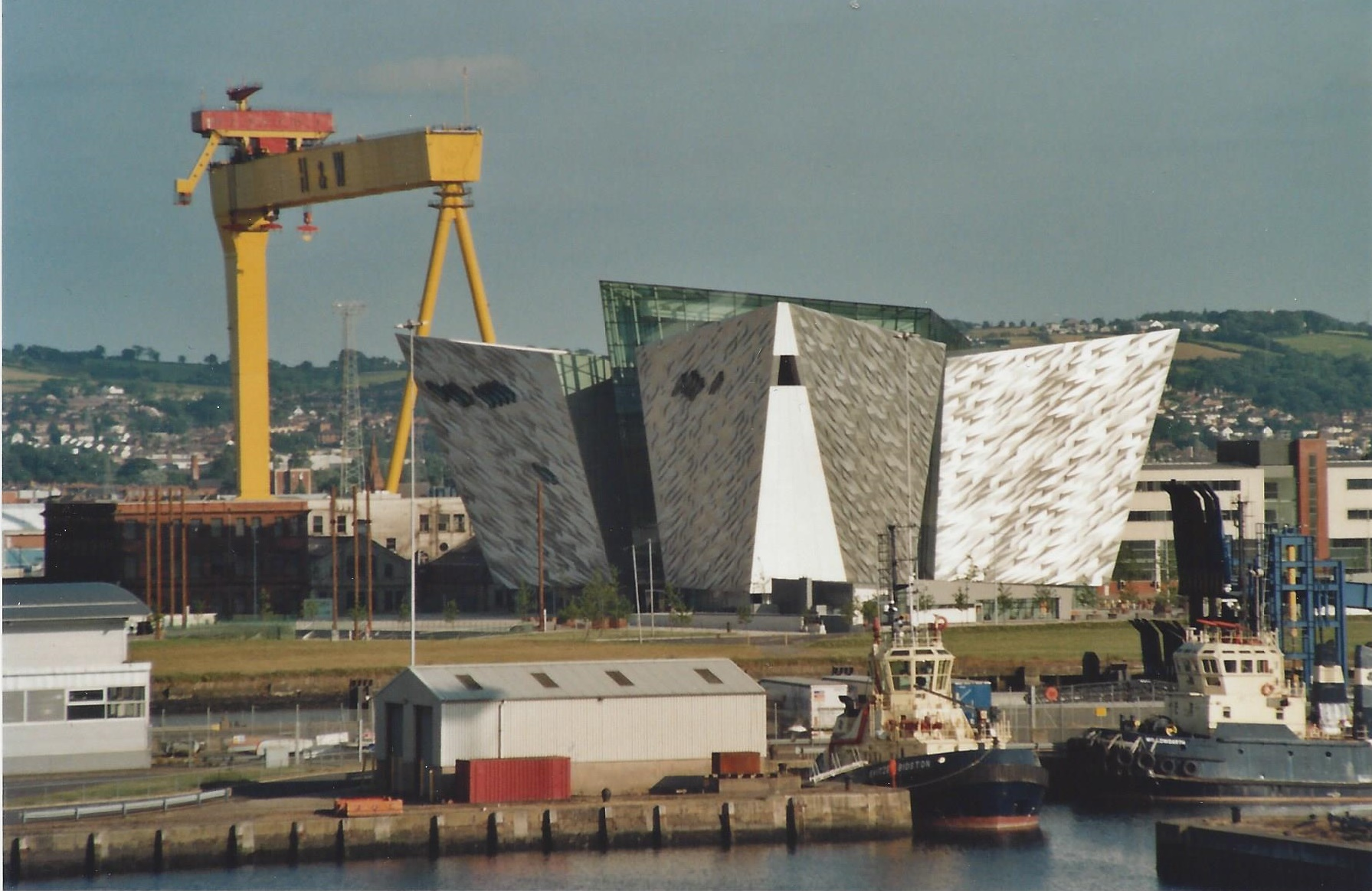 Fotografie des Titanic Museums in Belfast